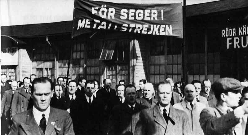 Metallstrejken 1945. Demonstration i Göteborg den 8 april med över 8000 deltagare.